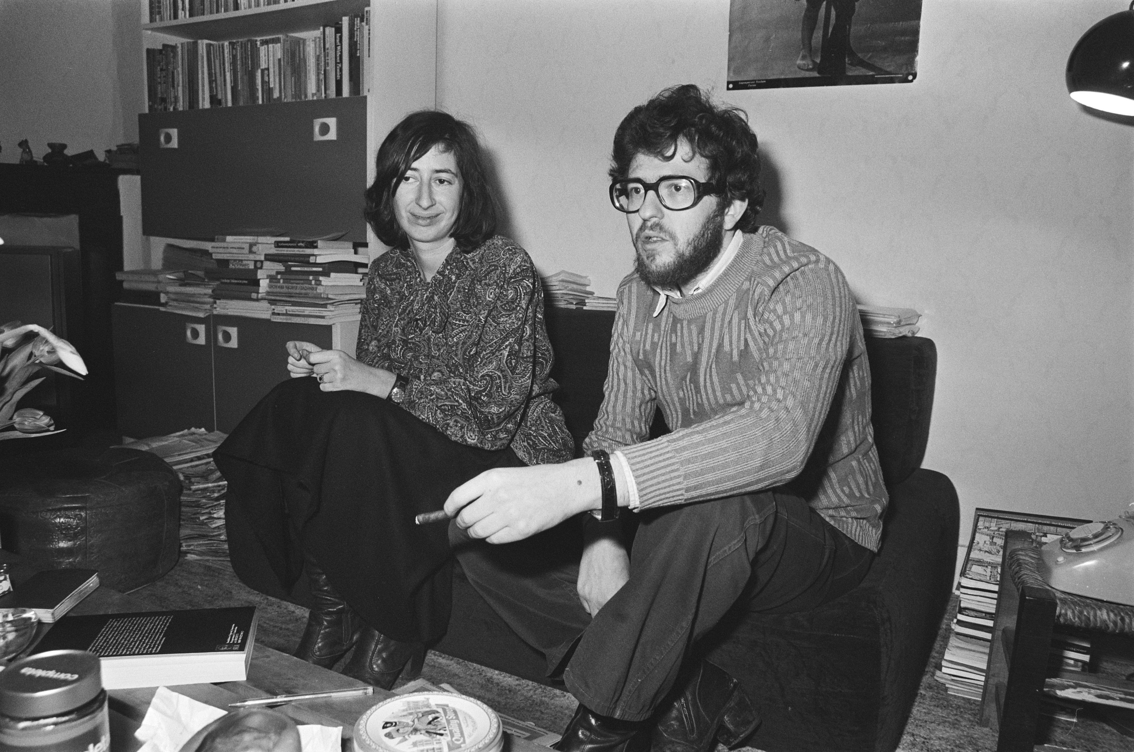 Max van Wezel met Anet Bleich, opdracht Volkskrant